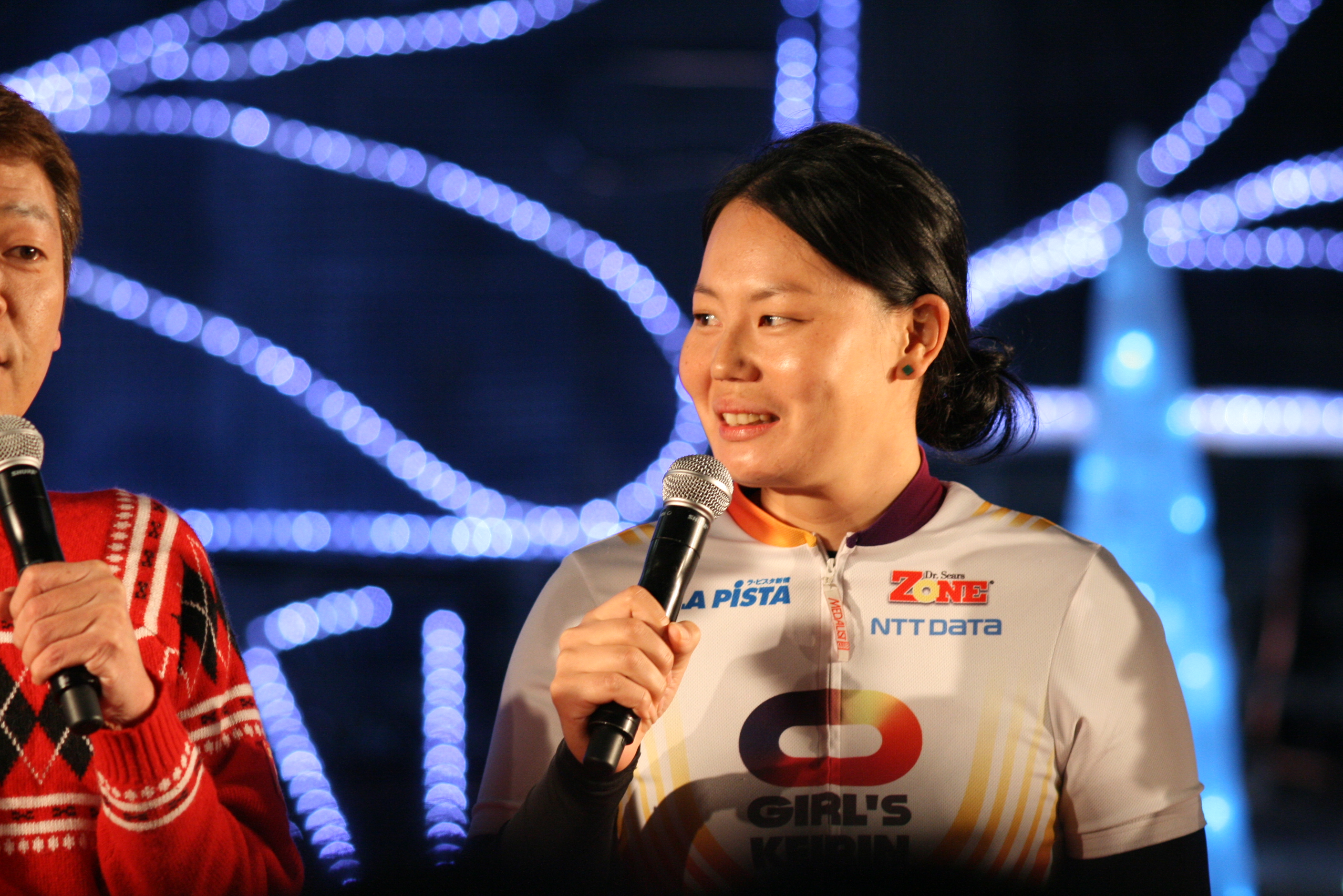 重光啓代 玉袋筋太郎 14/11/17 2014新橋イルミネーションフェスタ にて